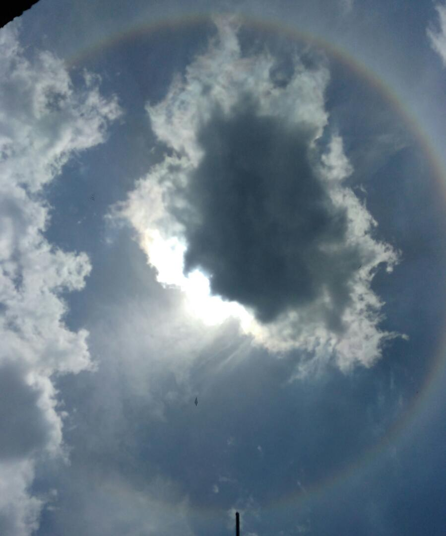 Halo Solar 05-4-2020 Caracas, las 12:30